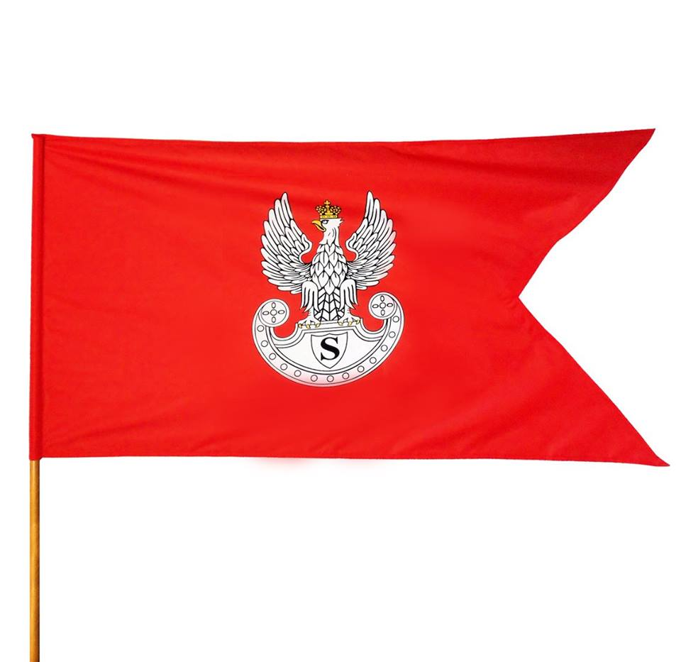 Flaga ZS"S" RP